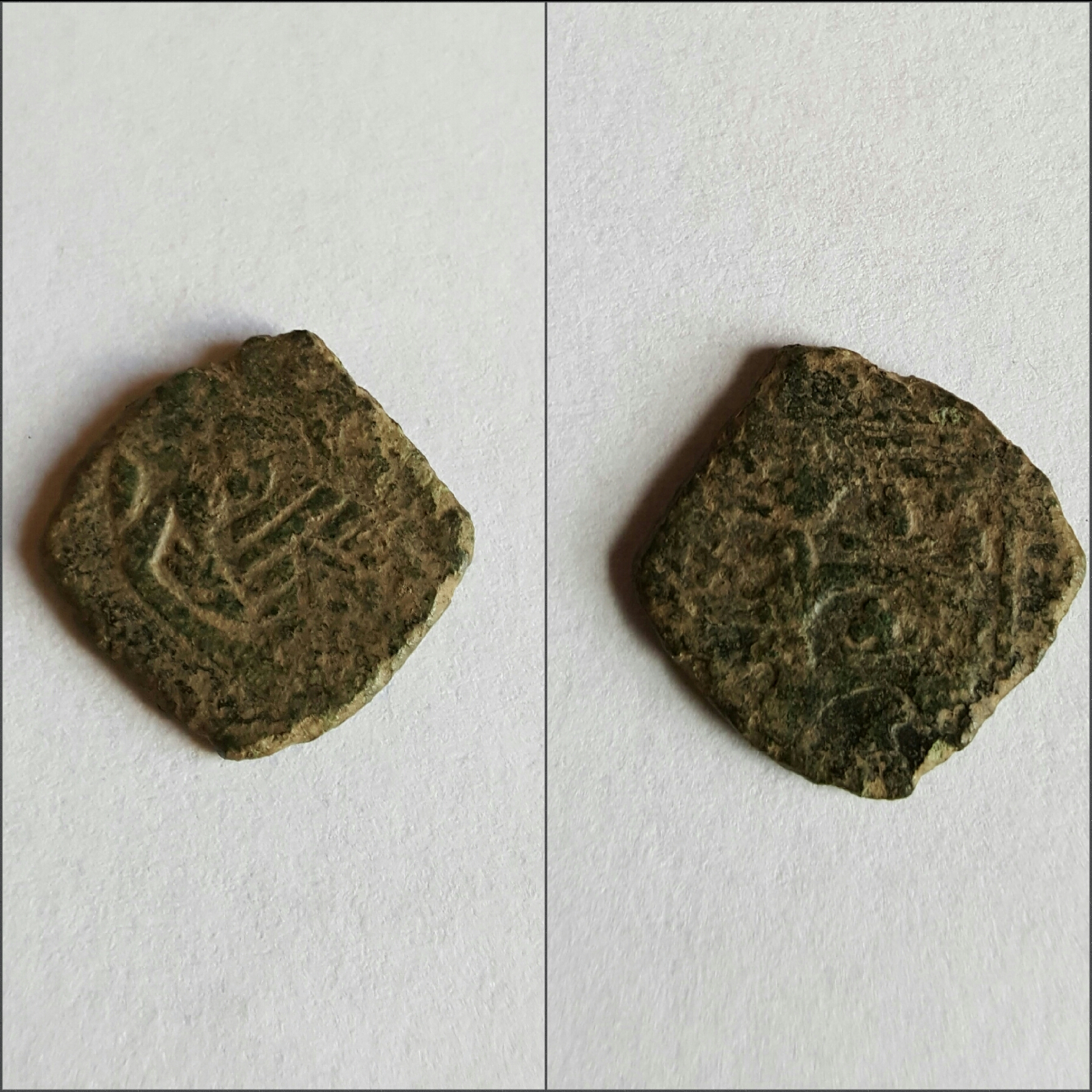 dies ist eine Klippe von 1518-23 von Christian II.